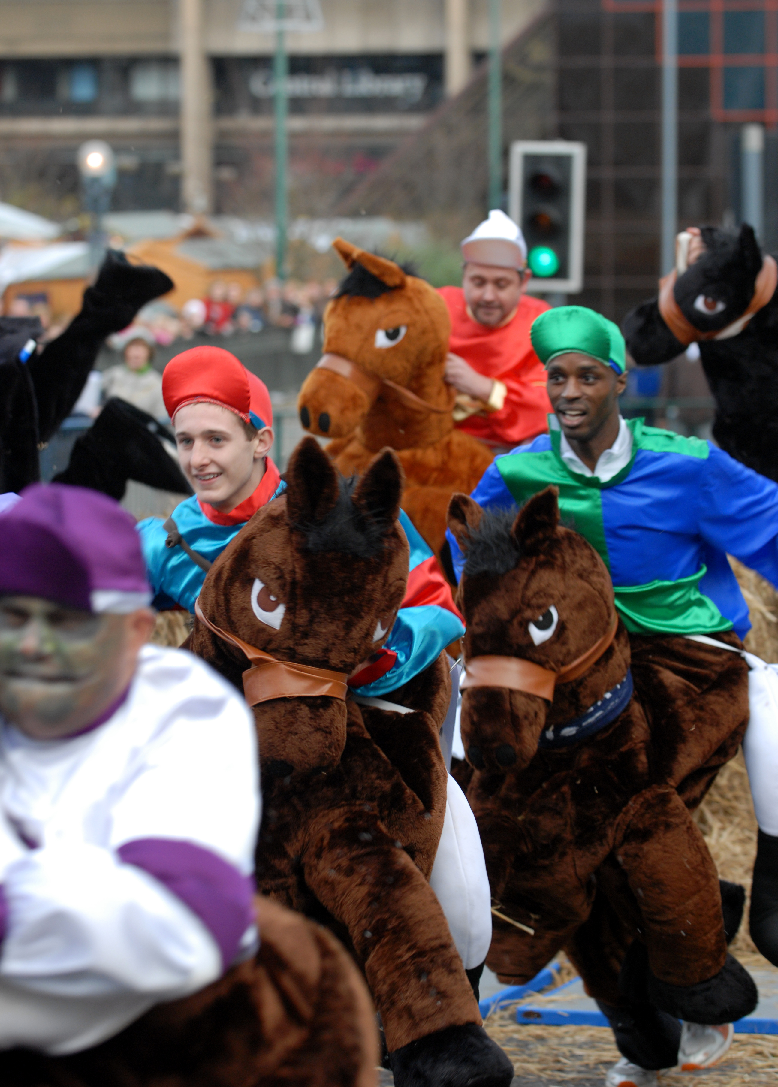 Credit